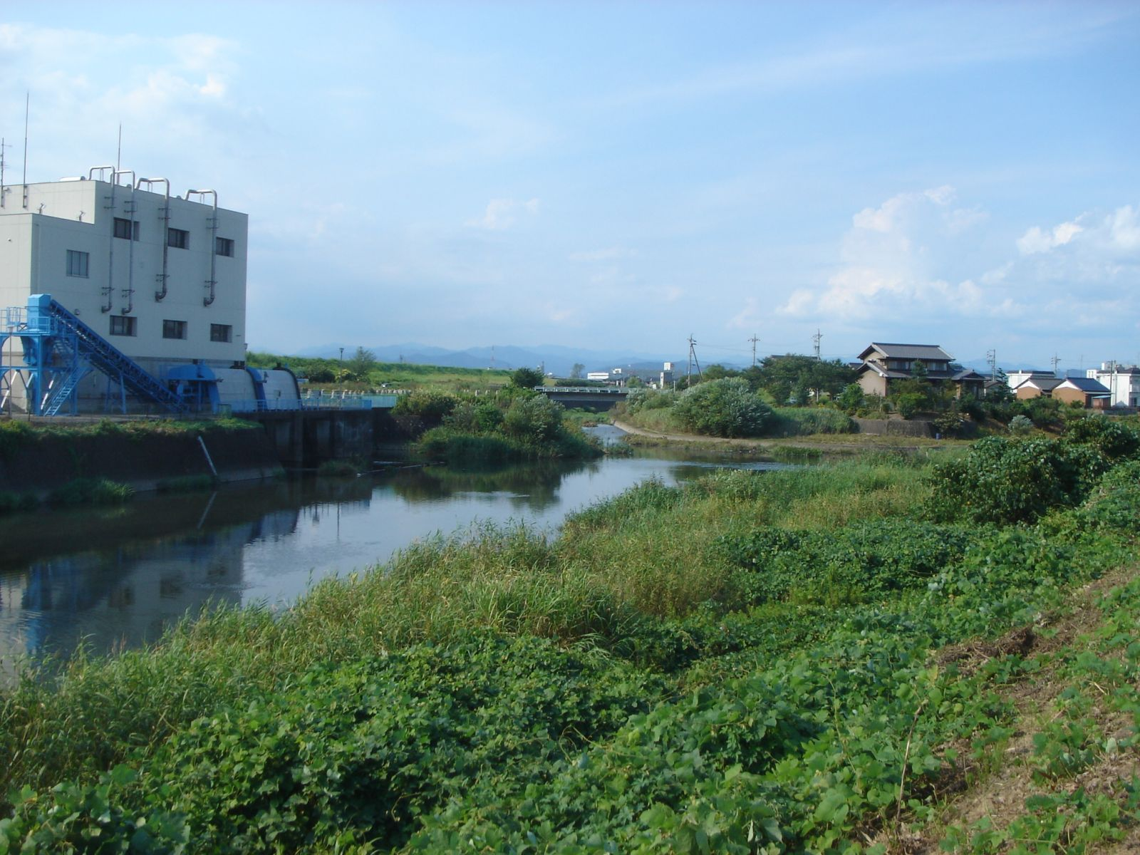 荒田川（論田川合流点）、岐阜県岐阜市次木付近で下流より撮影。奥左側が論田川